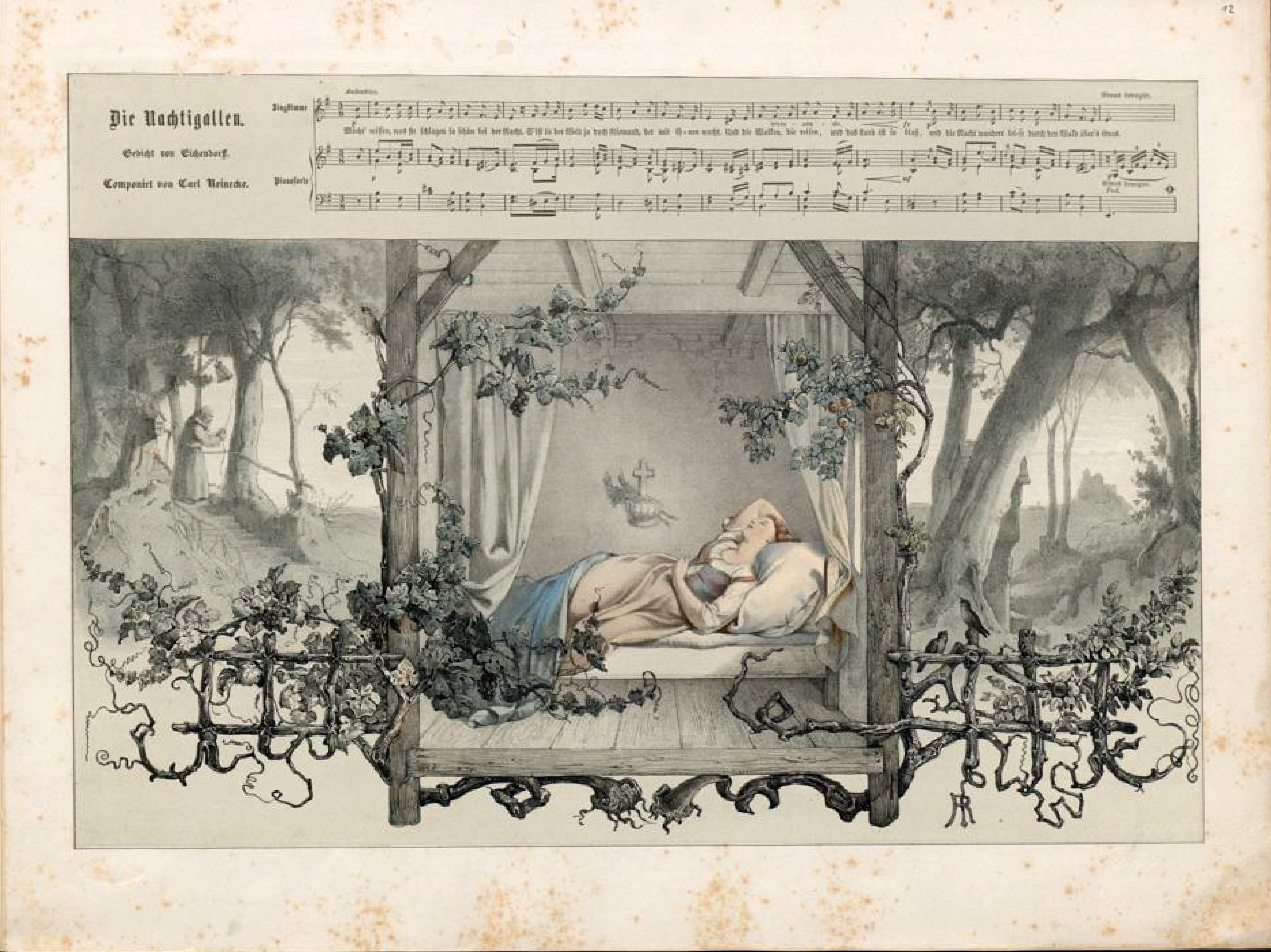 Düsseldorfer Lieder-Album, Arnz & Co. 1851, S. 25 – "Die Nachtigallen" Gedicht von Joseph von Eichendorff, Komponist Carl Reinecke, Farblithografie nach Illustration von Rudolph Jordan